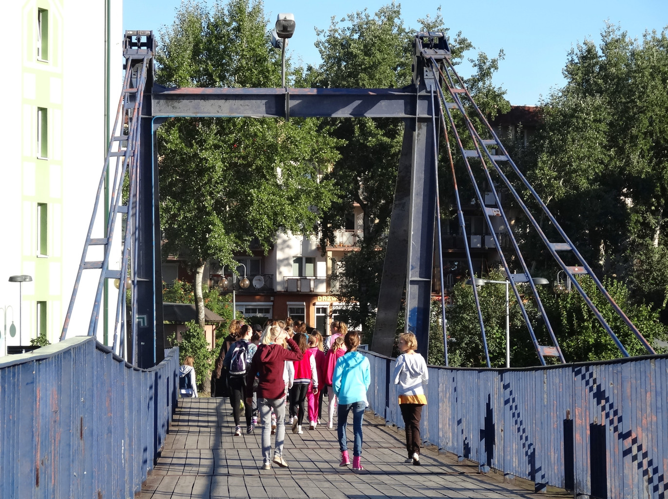 Kładka dla pieszych im. Esperanto przez Brdę w Bydgoszczy